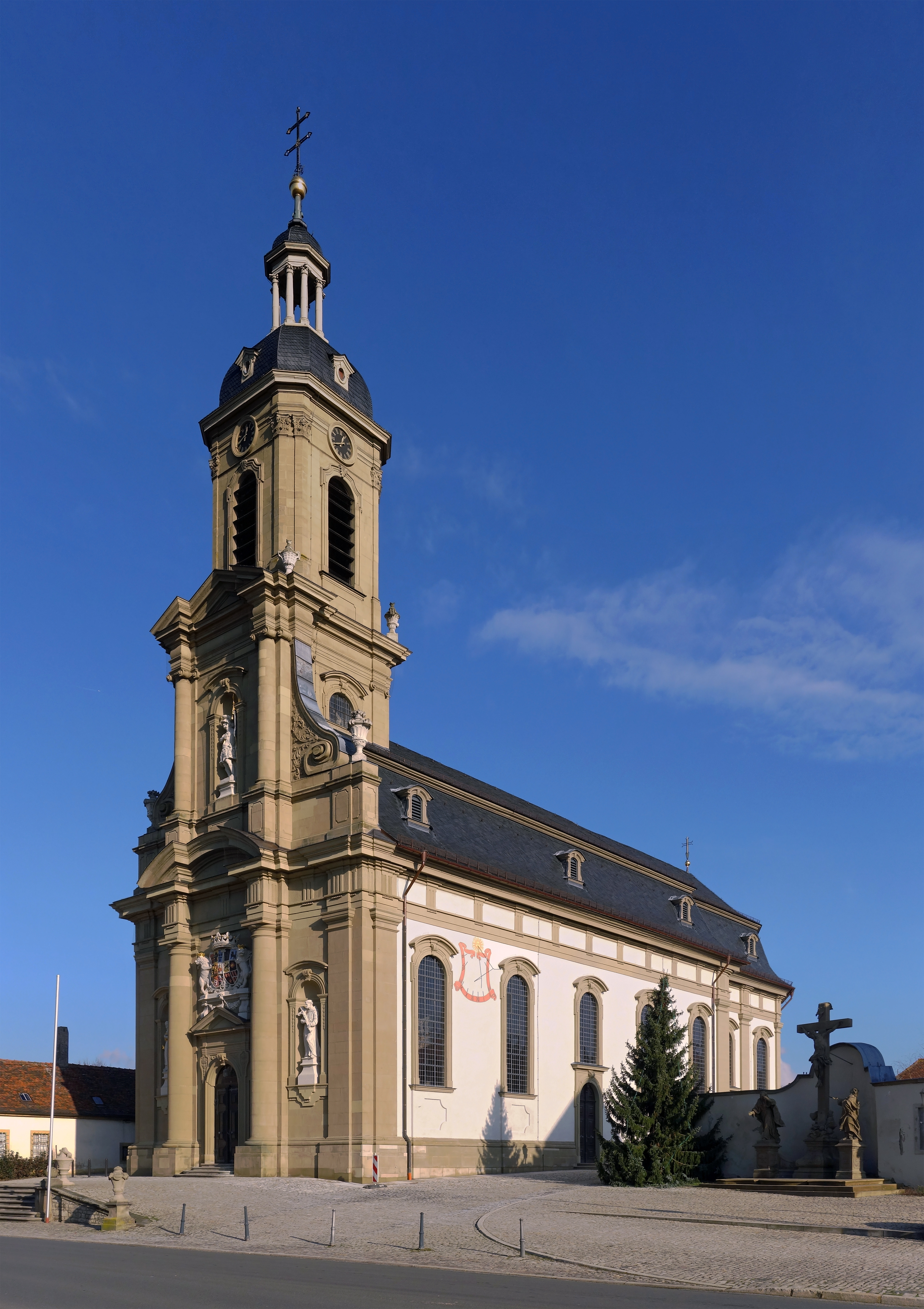 Pfarrkirche St.Mauritius in Wiesentheid wurde zwischen den Jahren 1727 und 1731 nach Plänen von Balthasar Neumann durch den Baumeister Johann Georg Seitz erbaut. Im inneren befindet sich ein Deckengemälde von Giovanni Francesco Marchini. This image was created with Hugin.